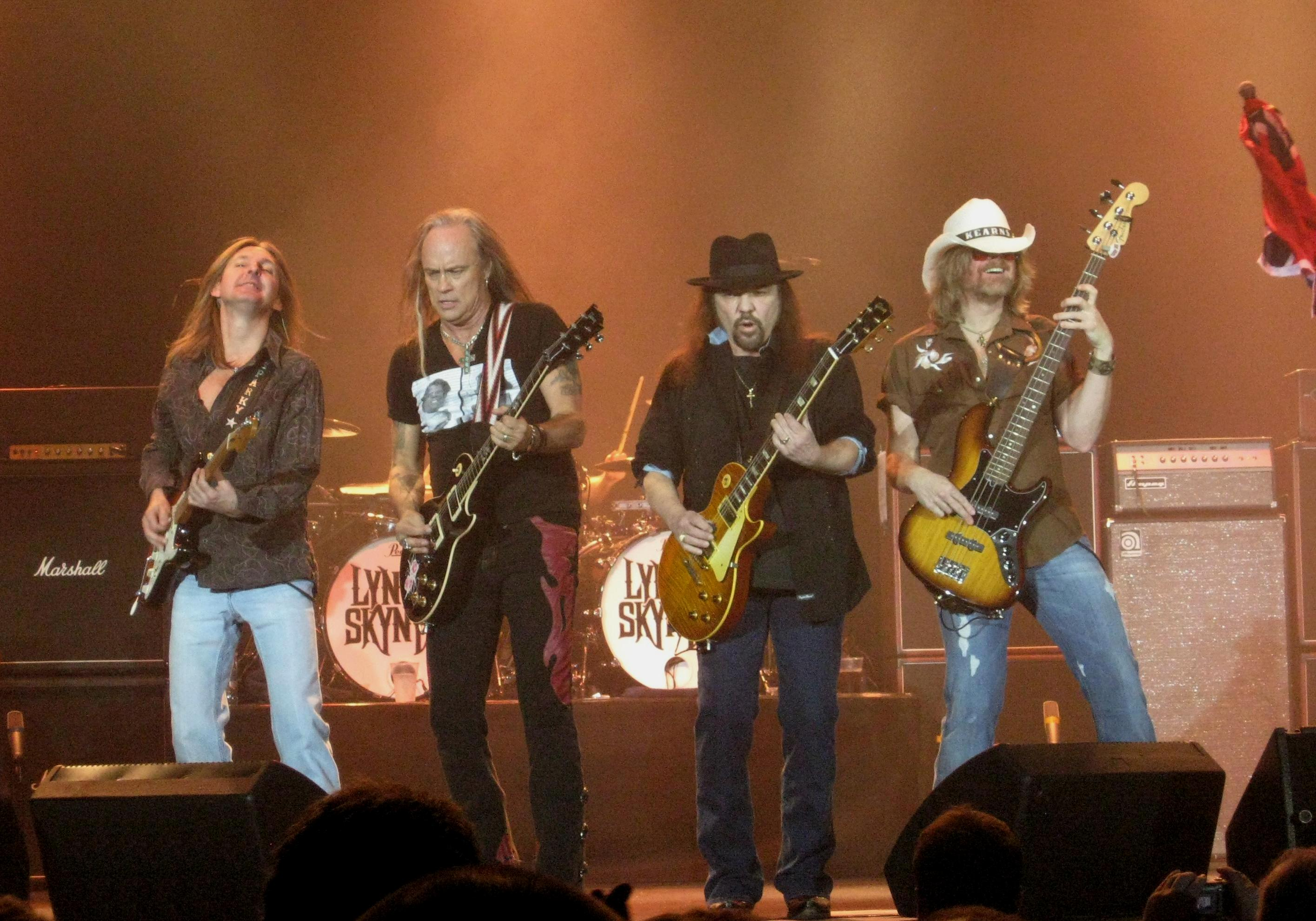 Lynyrd Skynyrd performing in Cardiff (2010).